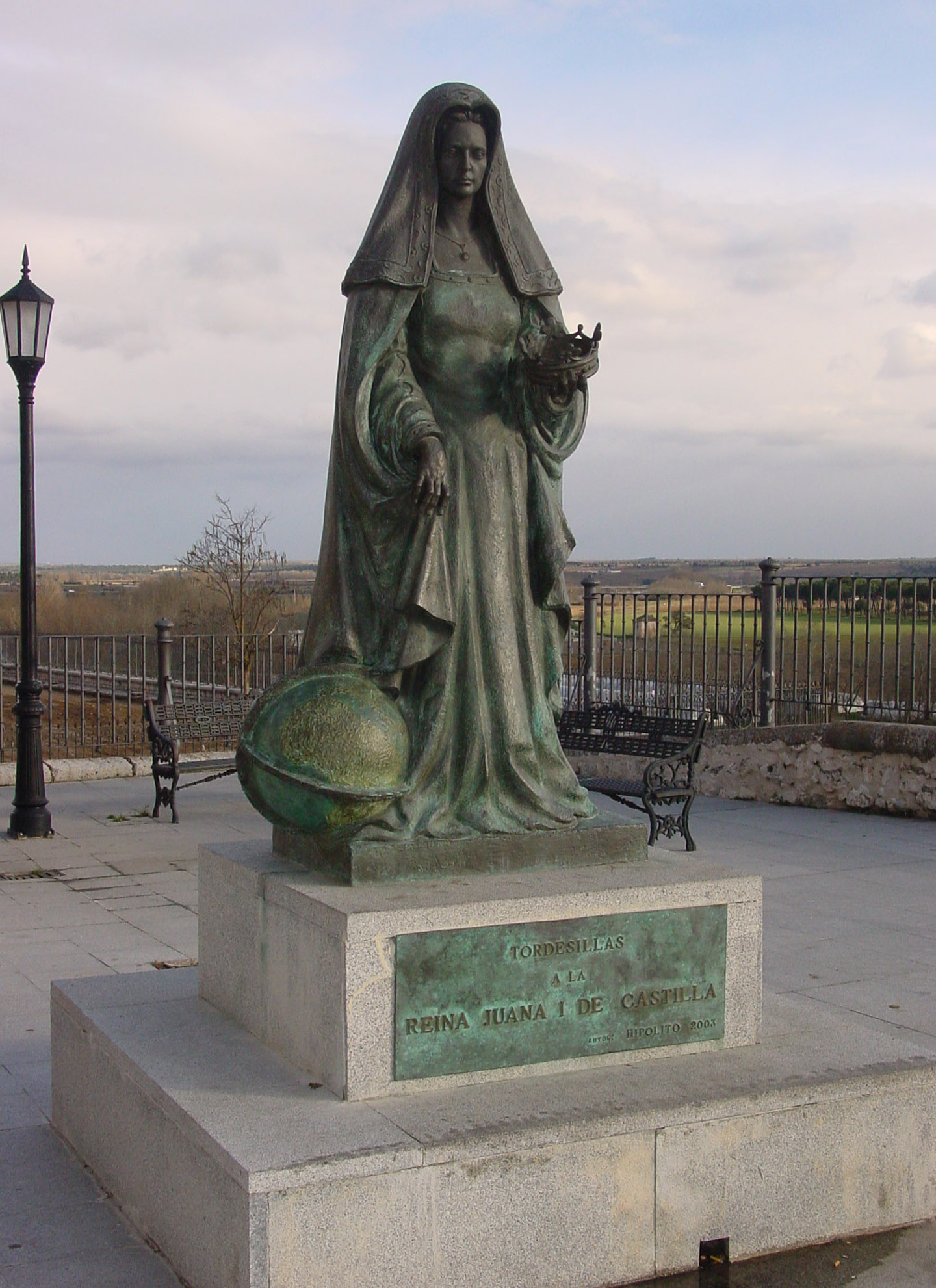 Estatua en bronce en homenaje a la reina Juana de Castilla (conocida como Juana la Loca). Se encuentra en la ciudad de Tordesillas, en la zona de los jardines pertenecientes al palacio donde estuvo recluida. El palacio ya no existe.